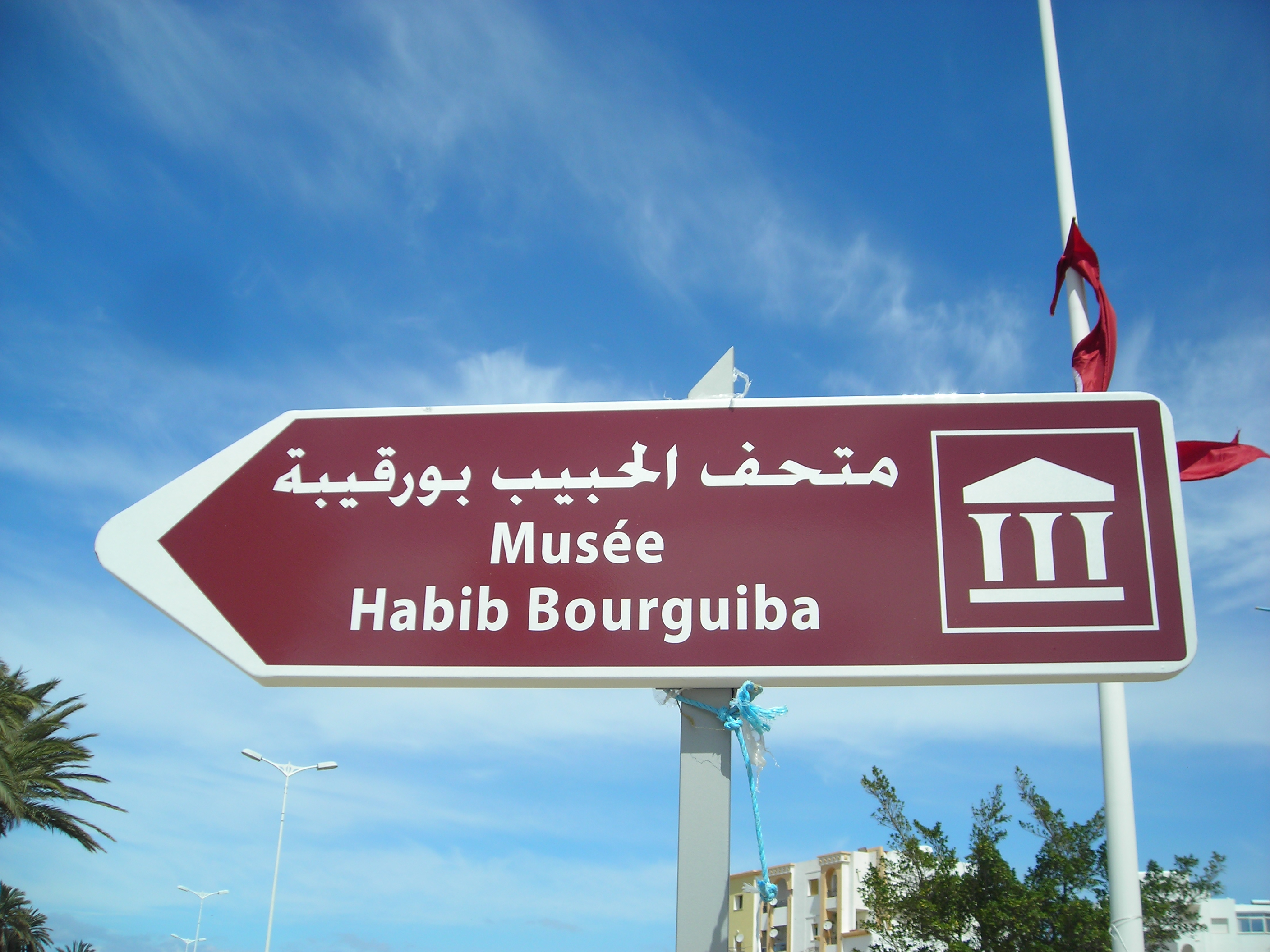 Musée Habib Bourguiba.